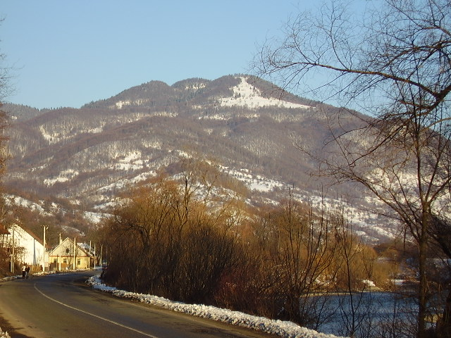 kympa